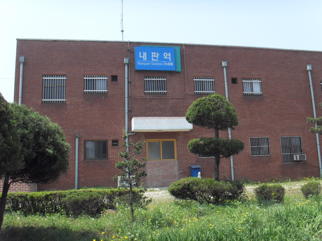 内板駅